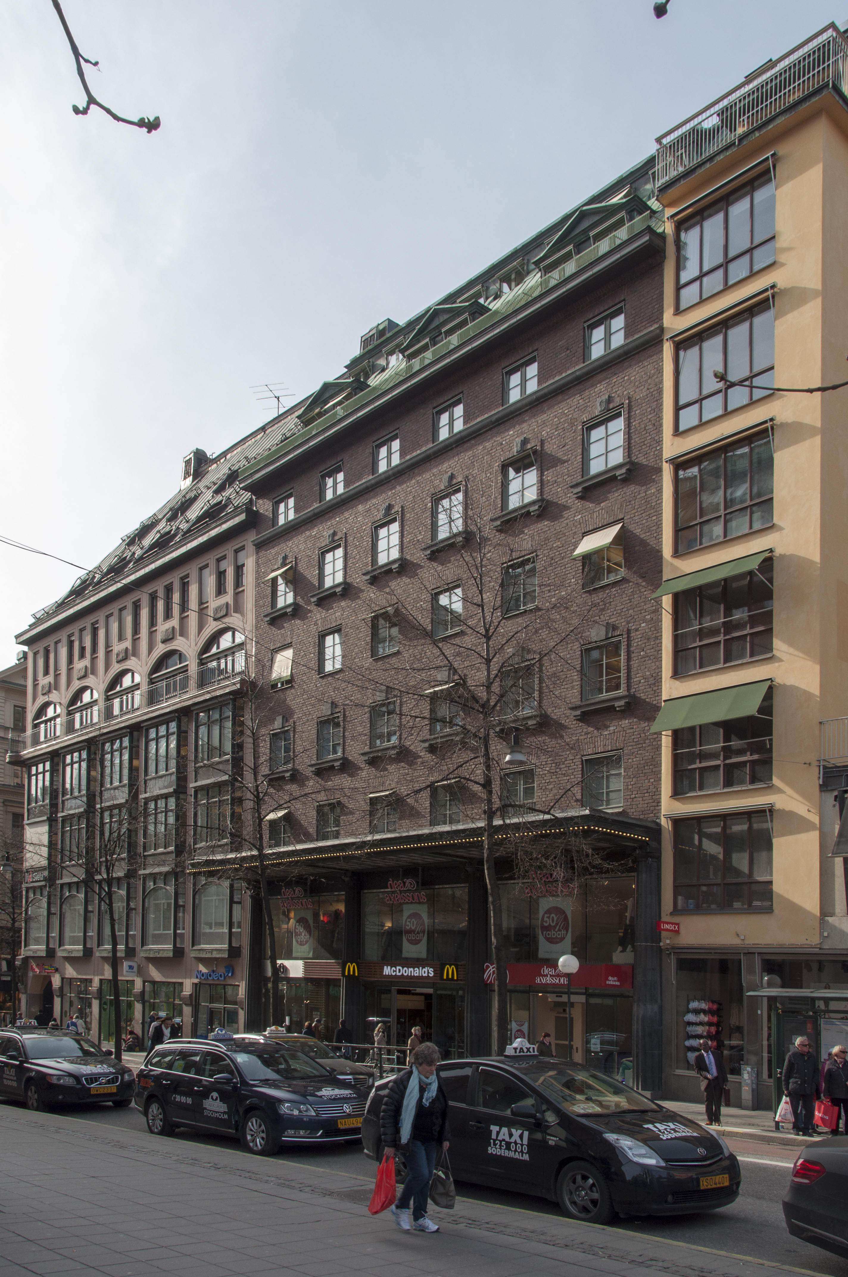 Vinkelhaken 10, Kungsgatan 50, Nybyggnadsår 1928 - 1930, Carl R. Lindström (Arkitekt) Frithiof Dahl (Byggmästare) Josef Jonsson (Byggherre)